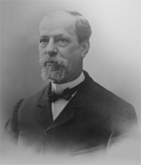 Photo Paulin Enfert 001